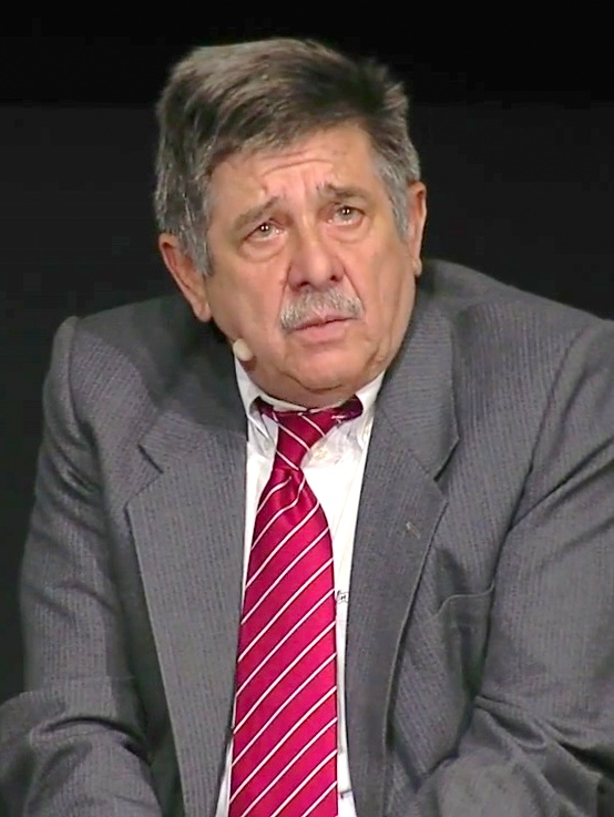 Intervención de Carlos Slepoy, Abogado, en el Panel de debate: "Presente y futuro de la Jurisdicción Universal" en la tercera jornada del Congreso Jurisdicción Universal en el Siglo XXI, organizado por la Fundación Internacional Baltasar Garzón (FIBGAR)